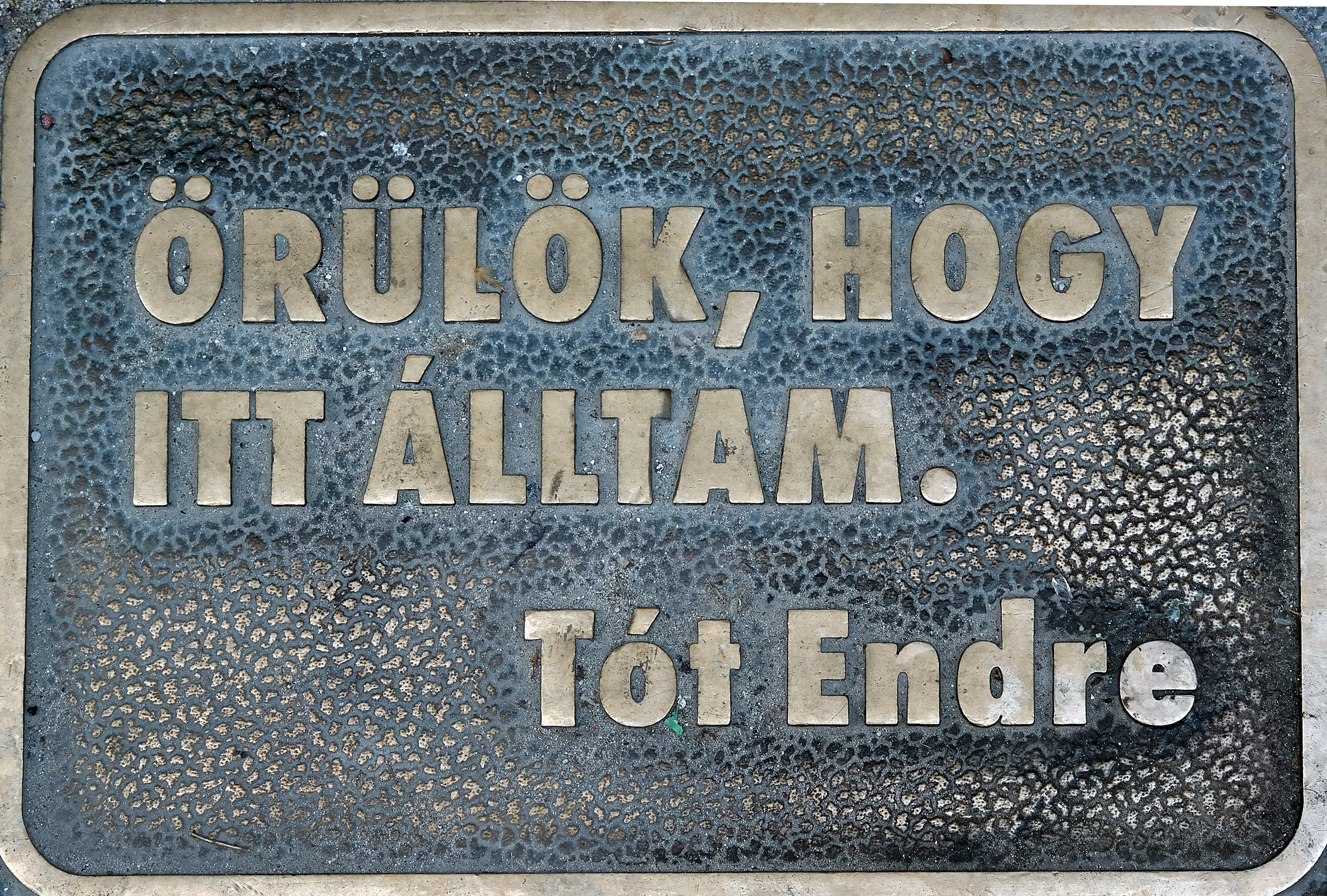 Tót Endre „önemléktáblája“. Budapest VI. kerület, Paulay Ede utca 60.